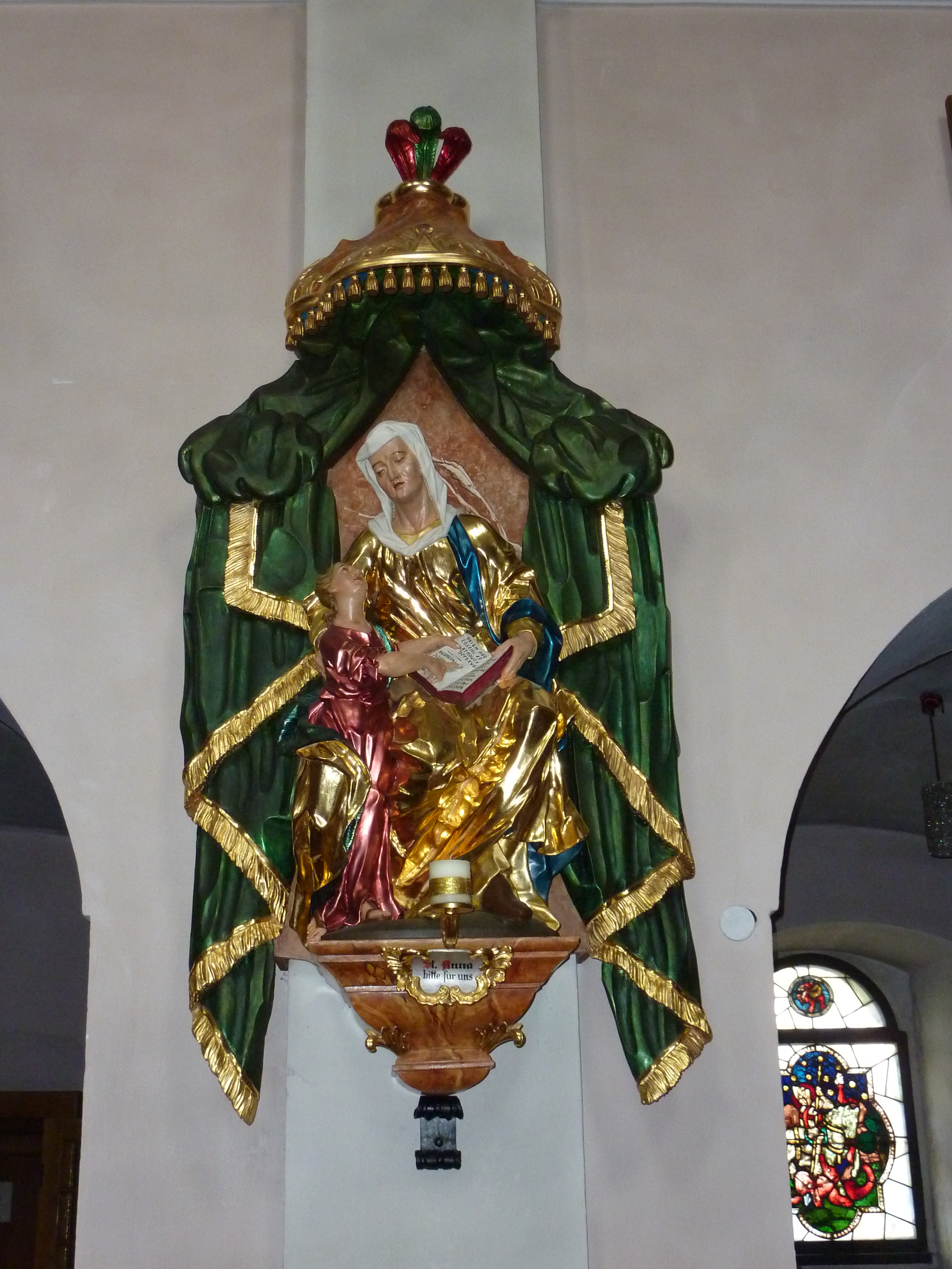 Pfarrkirche, Altenmarkt, Yspertal, Niederösterreich - Statue hl. Anna an der Nordseite des Langschiffes